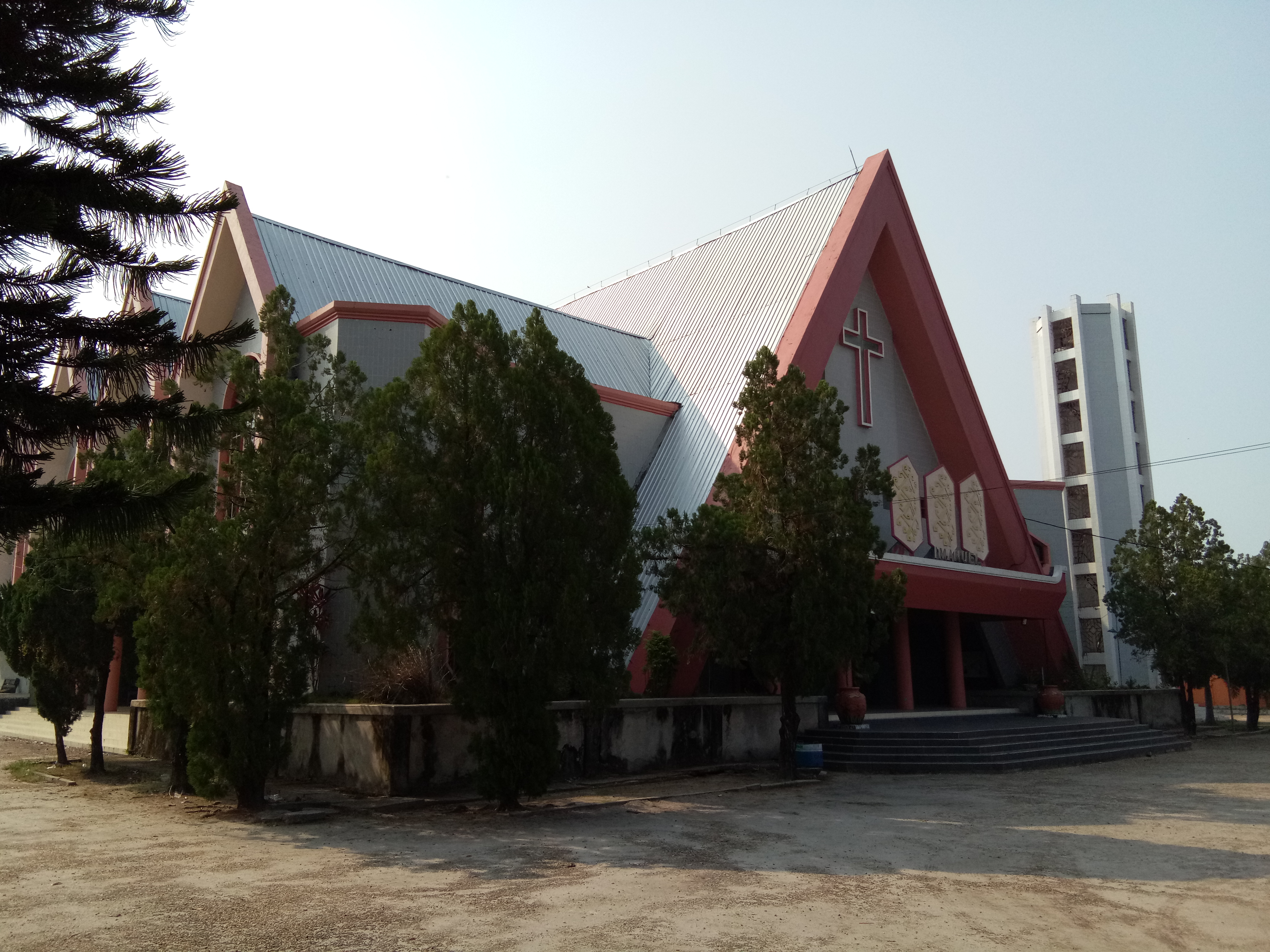 Gereja Permanen Pertama di Pahandut